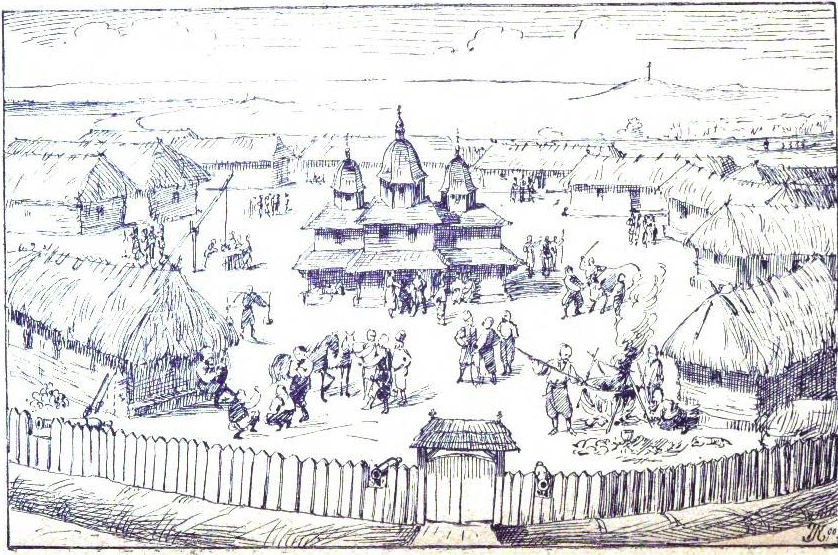 Істория України-Руси. Написав Олександер Барвіньский. 1904